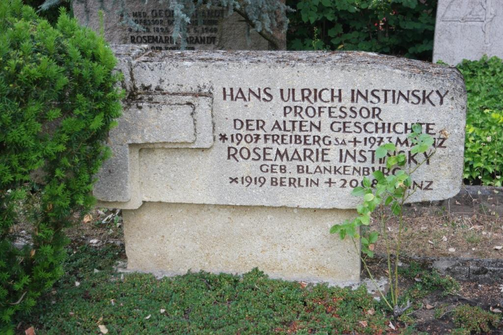 Grab des Althistorikers Hans Ulrich Instinsky, 1907-1973, auf dem Hauptfriedhof in Mainz